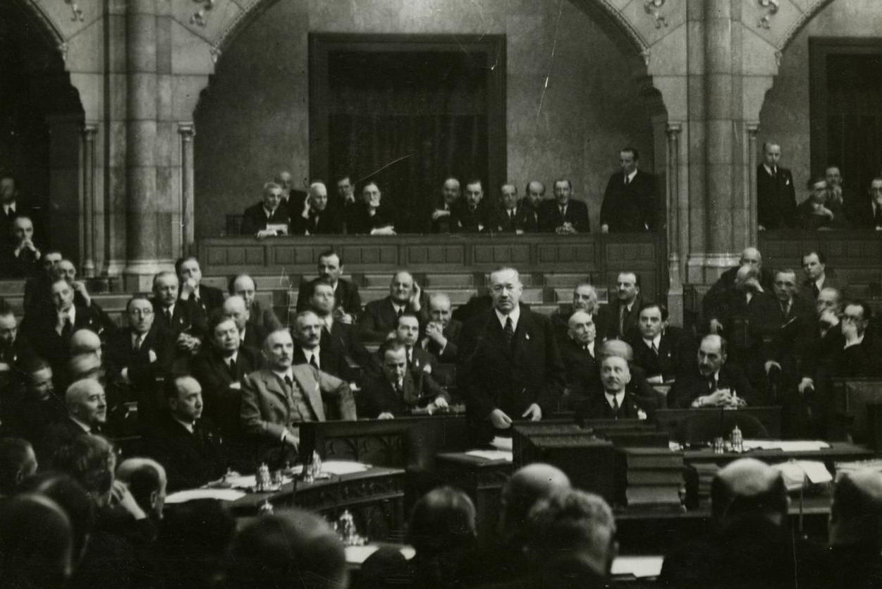 Darányi Kálmán miniszterelnök beszél az országgyűlésben, 1938. április.